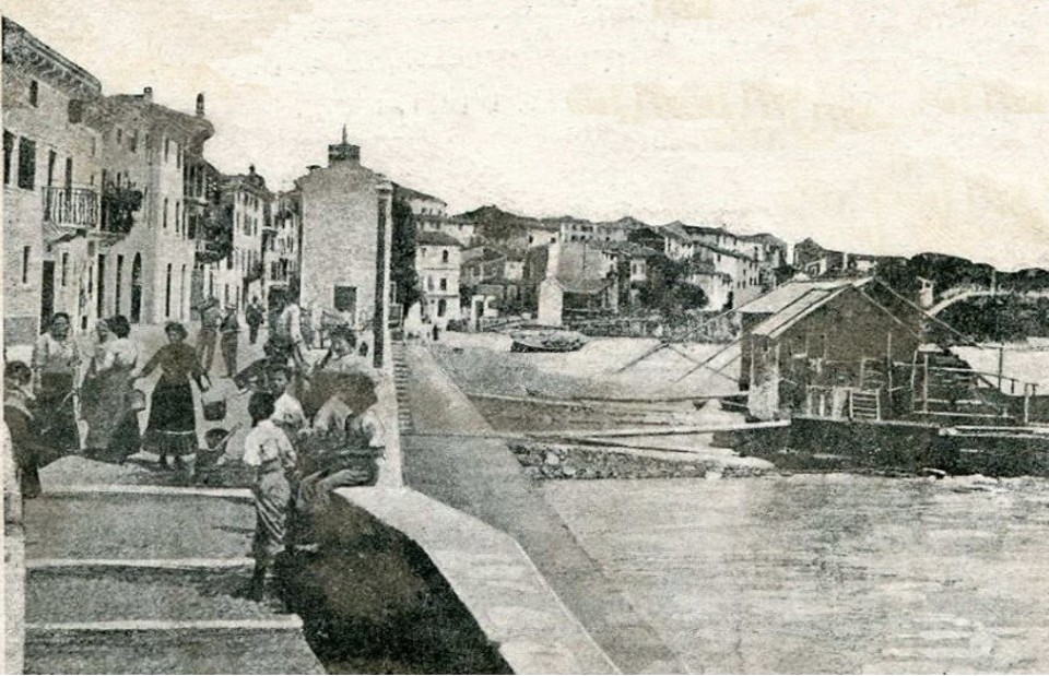 Pescantina (provincia di Verona) in una foto d'epoca